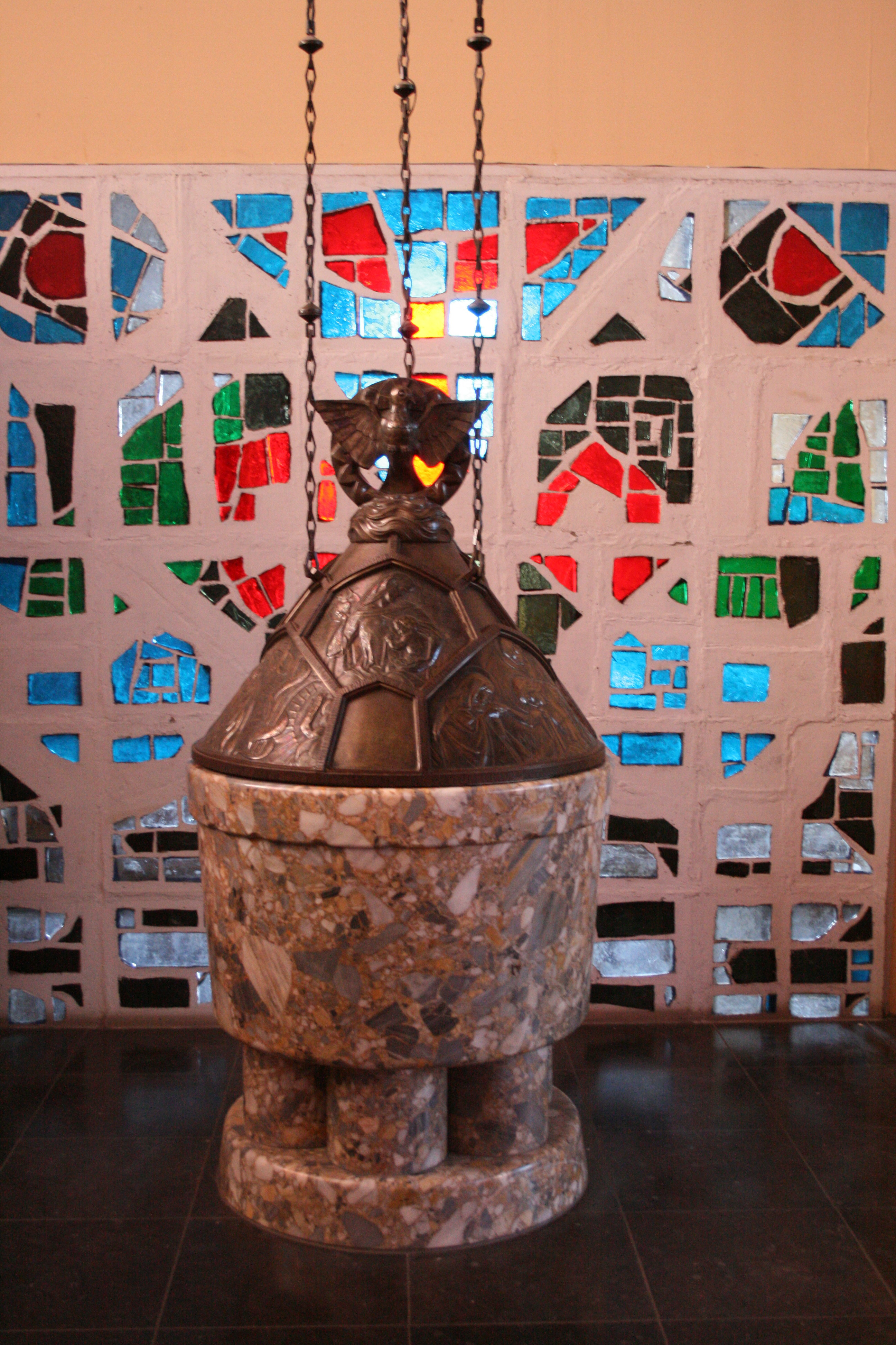 Schaerbeek, église Sainte-Suzanne, avenue Gustave Latinis (1928). Architecte: Jean Combaz. Art déco. Fonts baptismaux (1935)